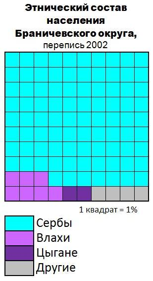 Этнический состав населения Браничевского округа (Сербия)